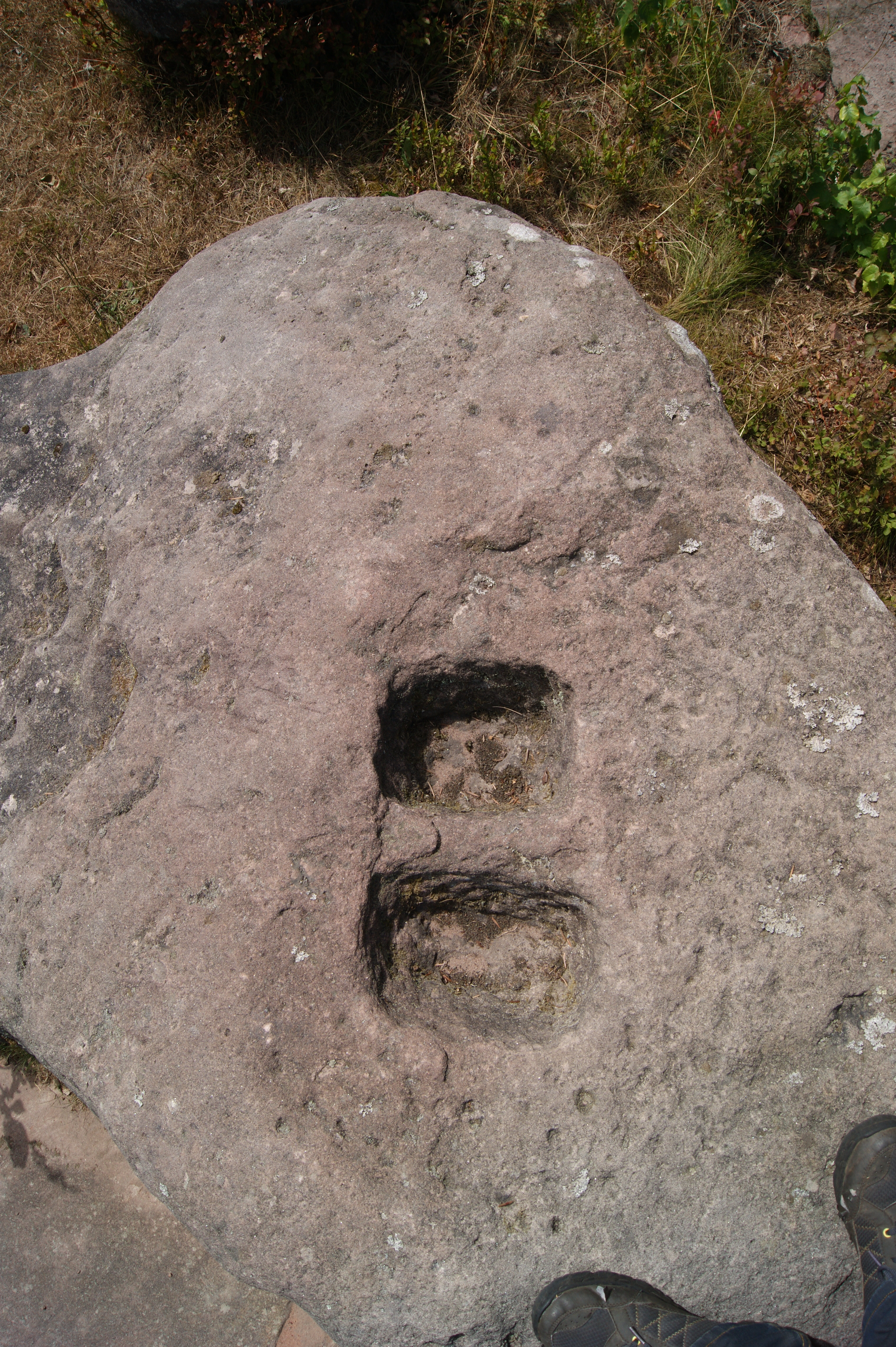 Site archéologique de la Croix-Guillaume à Saint-Quirin (Moselle, France) : encoches antiques d'un engin de levage